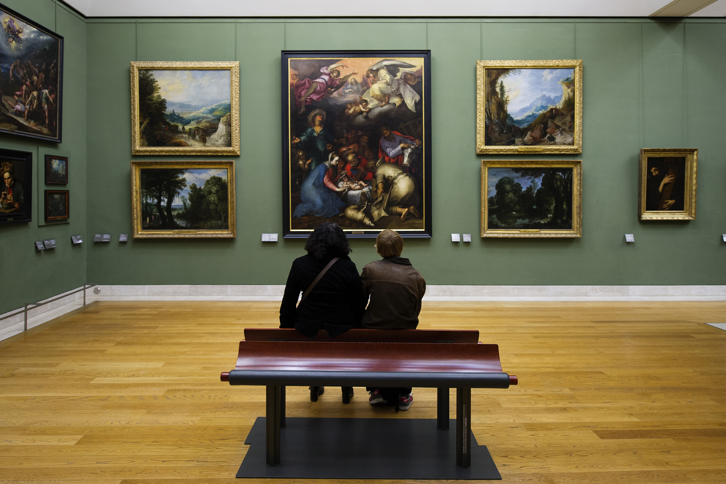 Two children, Musee du Louvre, Paris.